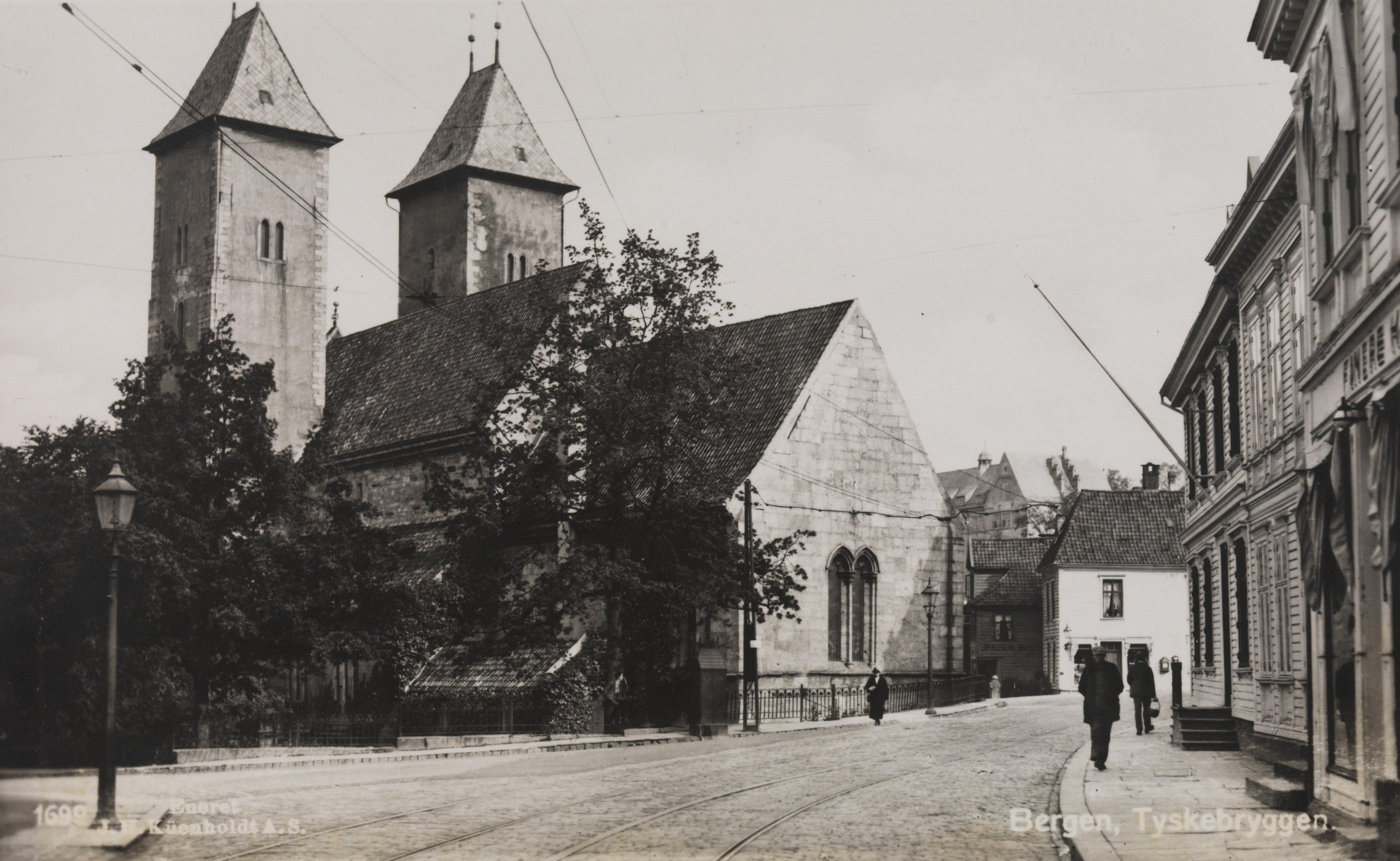 Bildet er hentet fra Nasjonalbibliotekets bildesamling Mariakirken, Bergen, Hordaland